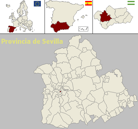 Situación del municipio de Tomares (Sevilla)